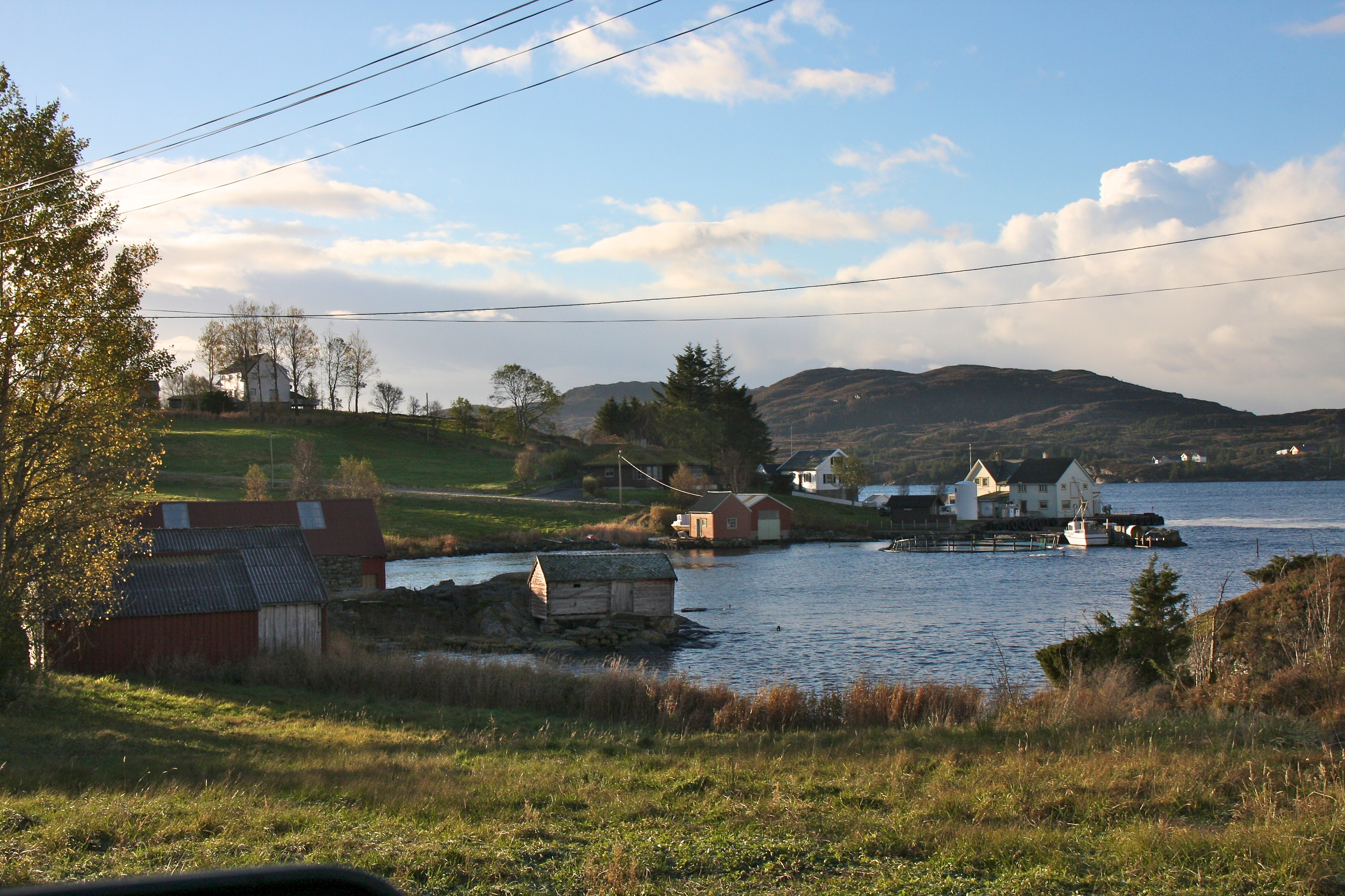 Bilder fra Gulen